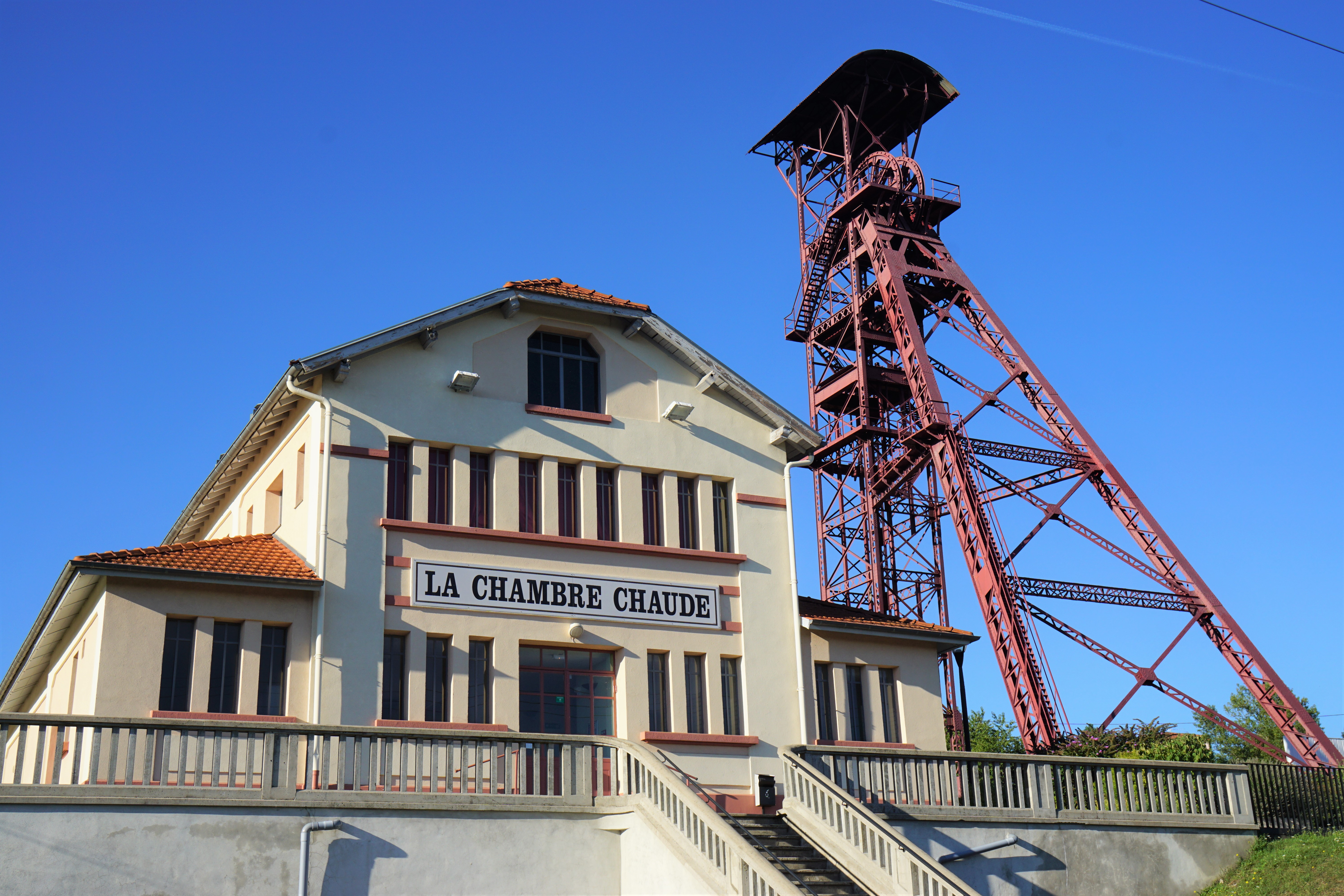 Le chevalement du puits des Graves et la "chambre chaude" (vestiaire des mineurs).